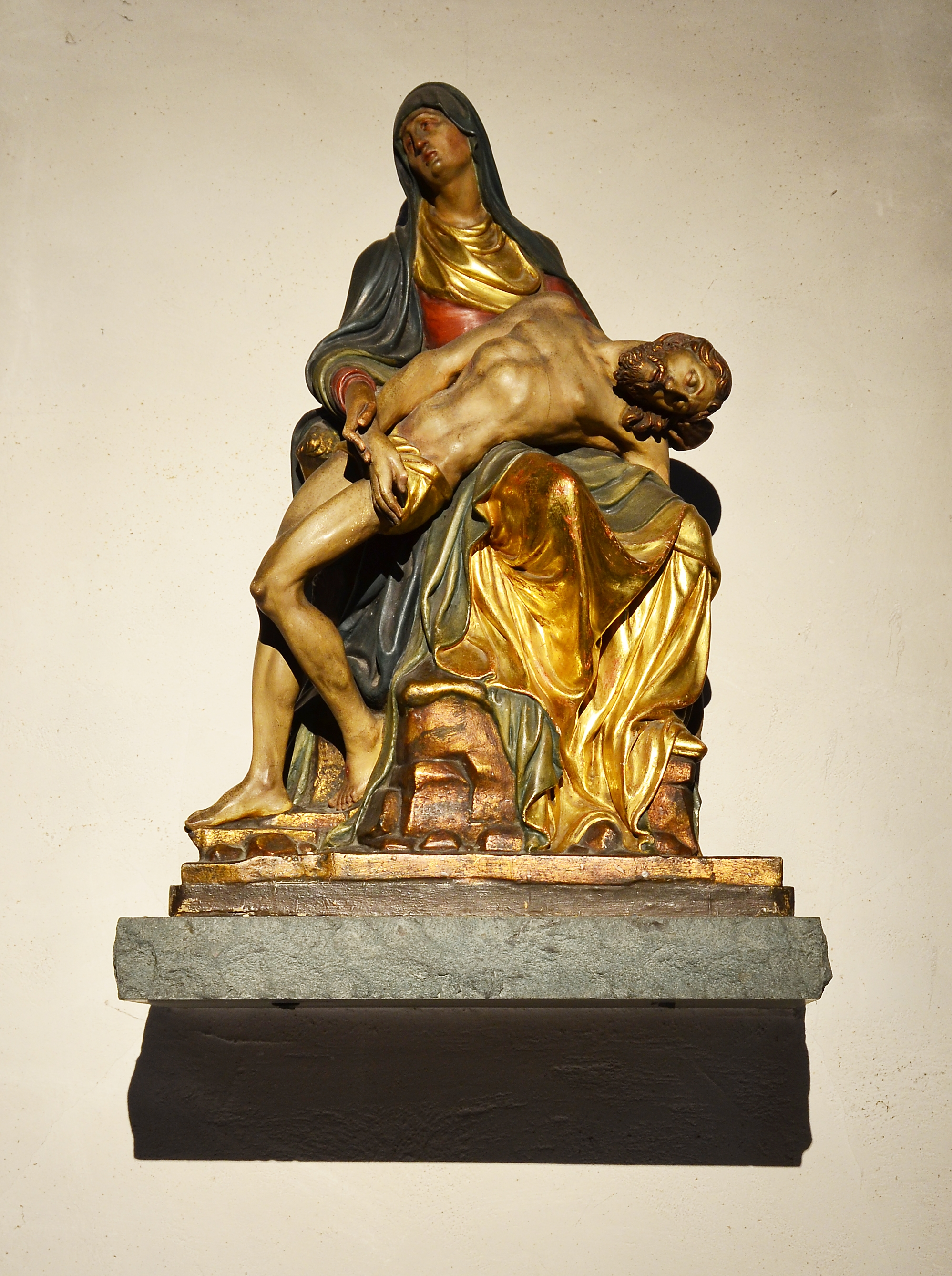 denkmalgeschützte Propsteikirche, Pietà von Gerhard Gröninger, aus der Zeit um 1600